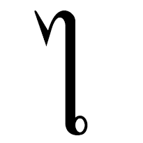 Сара ай майлалай (таиланд)